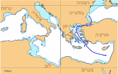 אוניית המעפילים גאולה - מסלול